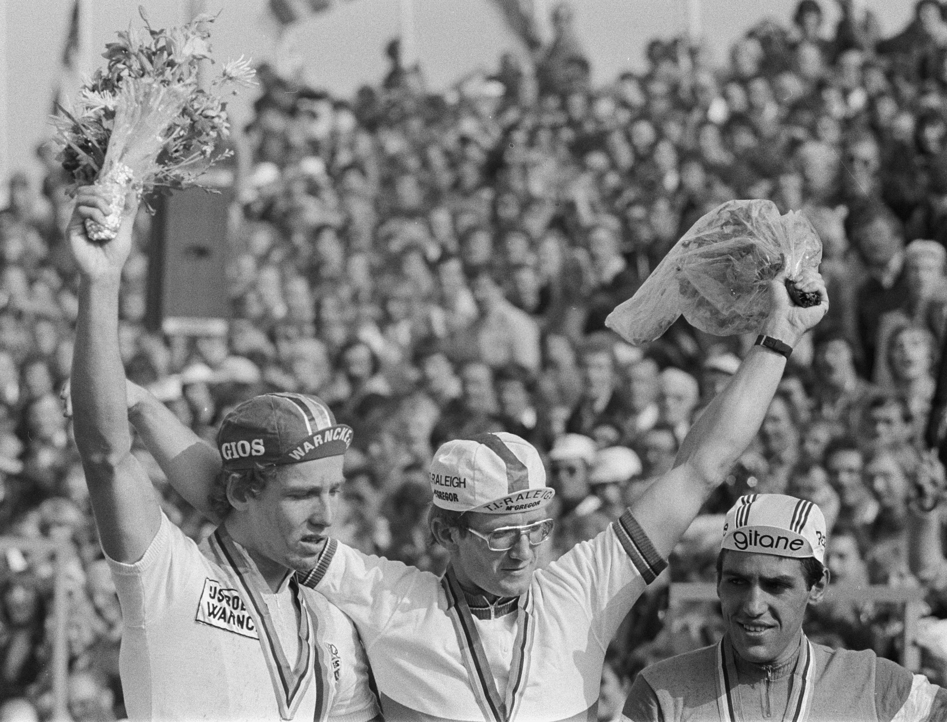 Wereldkampioenschappen Wielrennen 1979 te Valkenburg: Dietrich Thurau, Jan Raas, Jean-René Bernaudeau